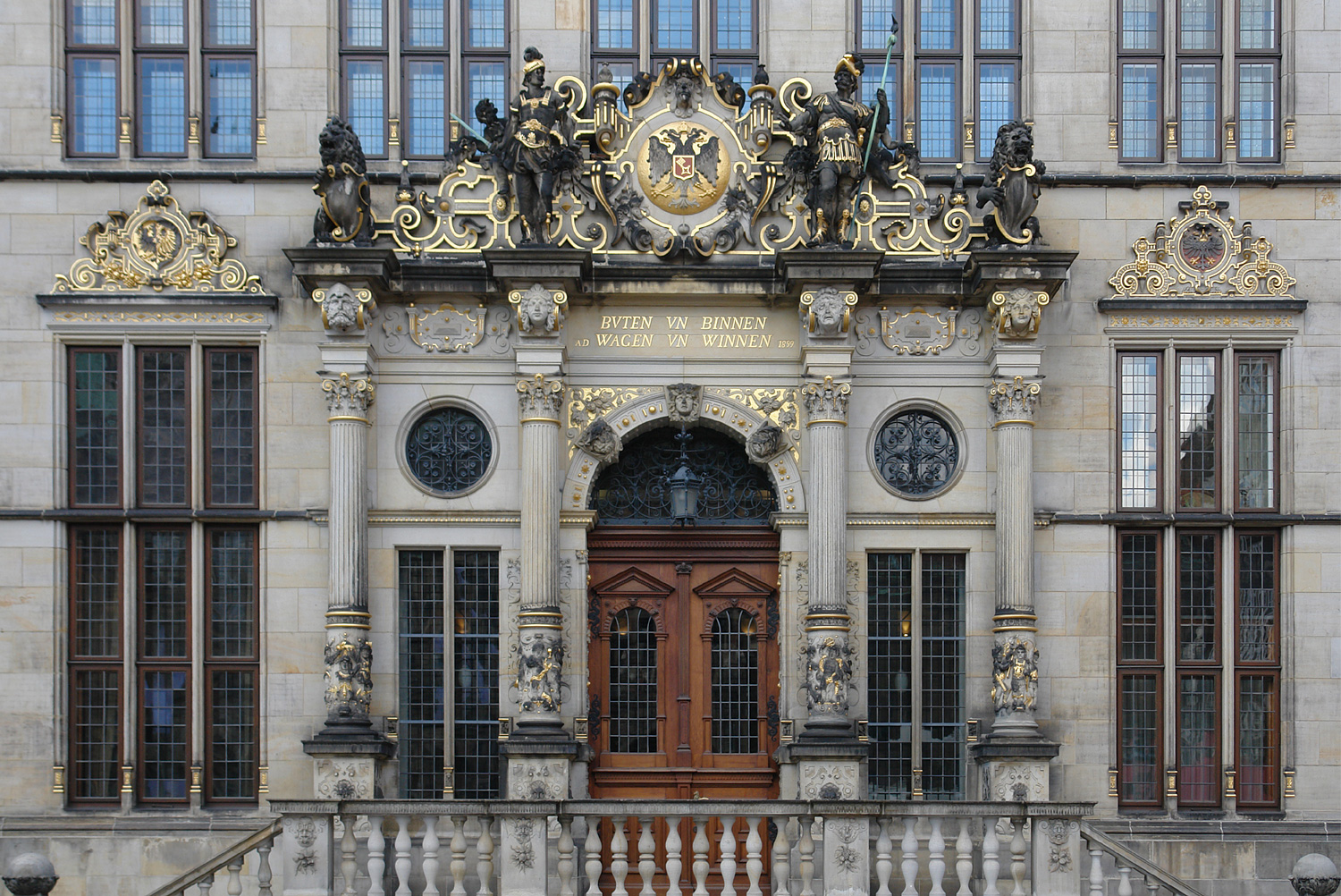 Portal von Haus Schütting am Bremer Marktplatz nach der Renovierung 2010